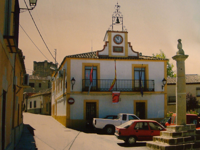 Ayuntamiento de Guadamur. A la derecha, el rollo de justicia; a la izquierda, la torre del homenaje del castillo.